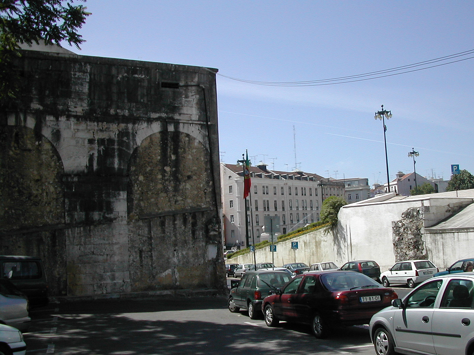 Localização original do Arco de São Bento, rua de São Bento, Lisboa